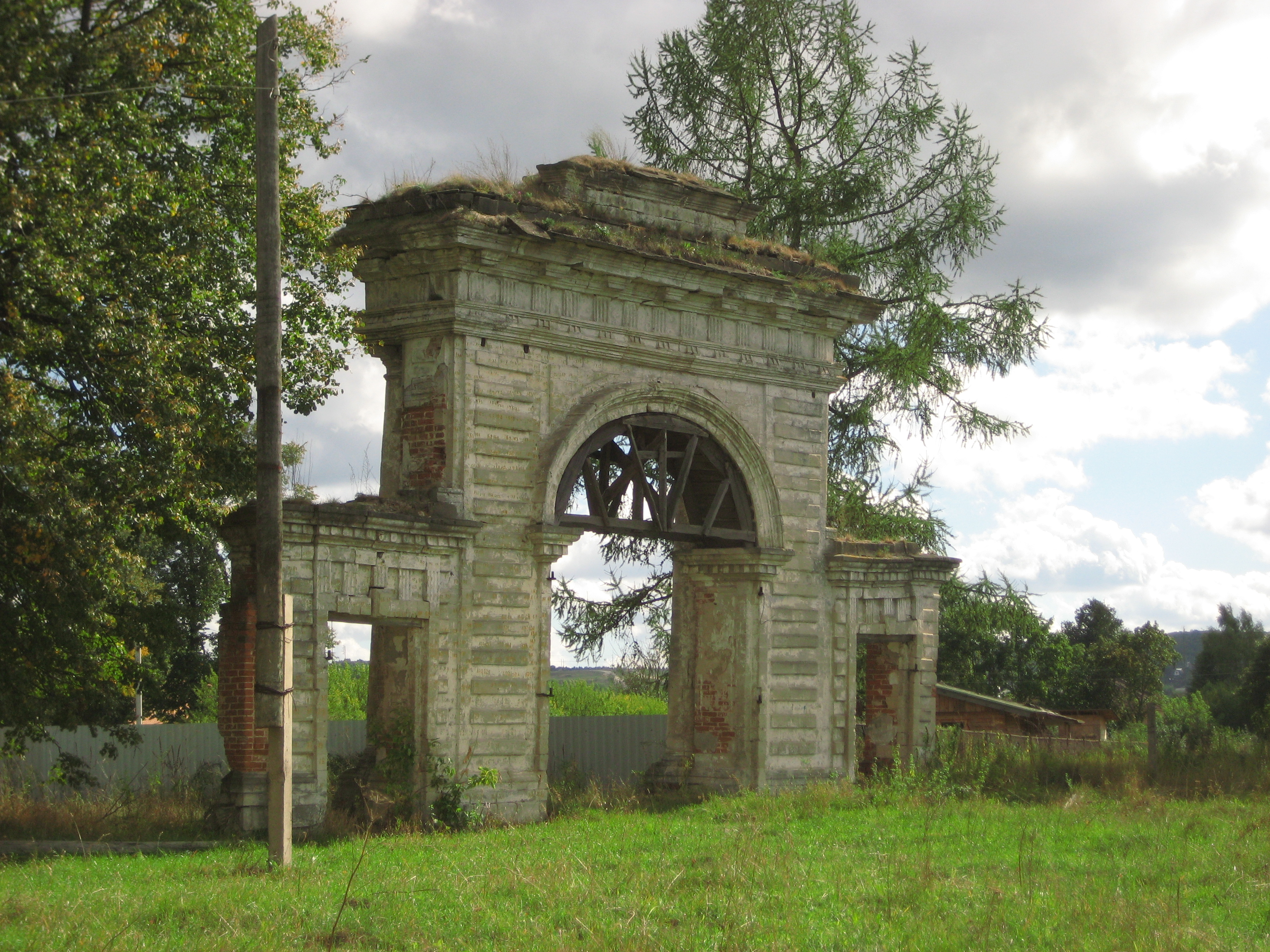 Троицкое, Калужская область. Парадные ворота, руины